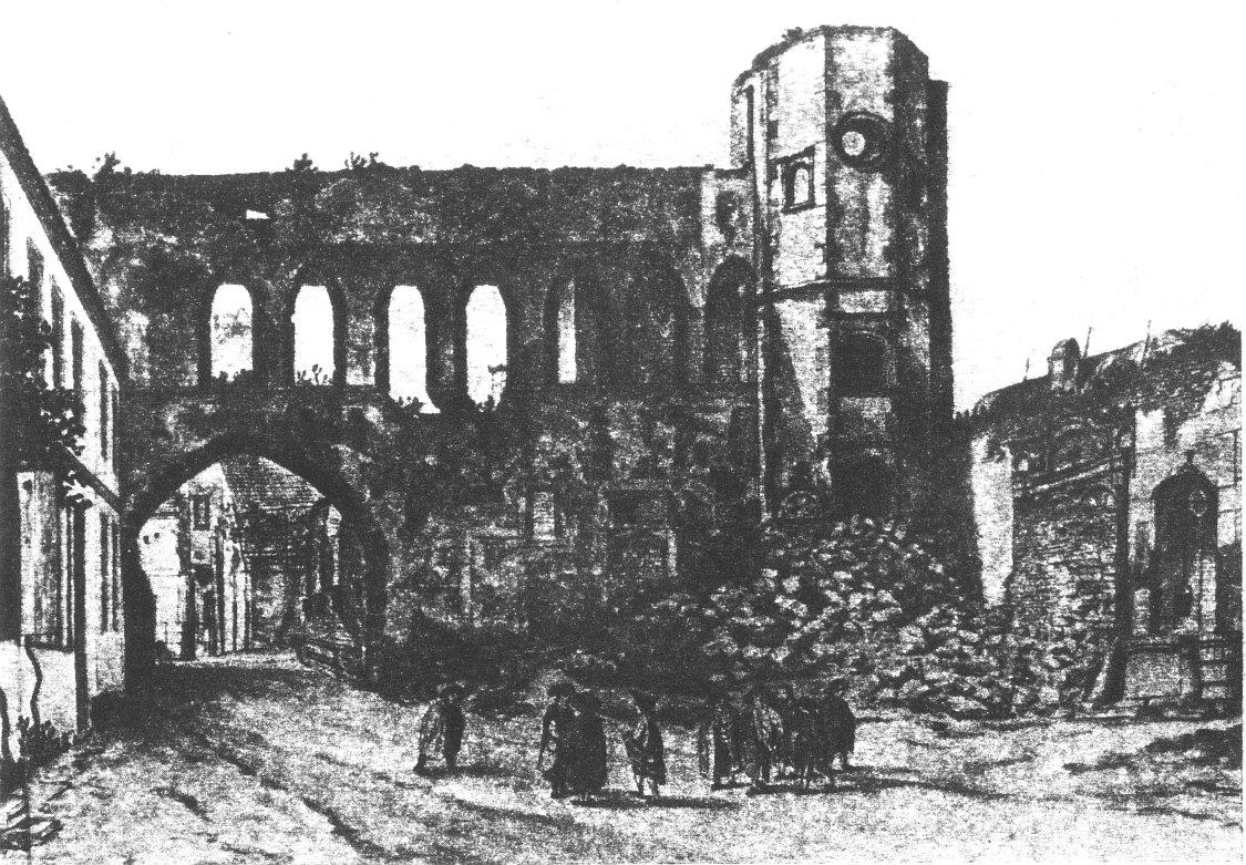 Speyer, Ratshof